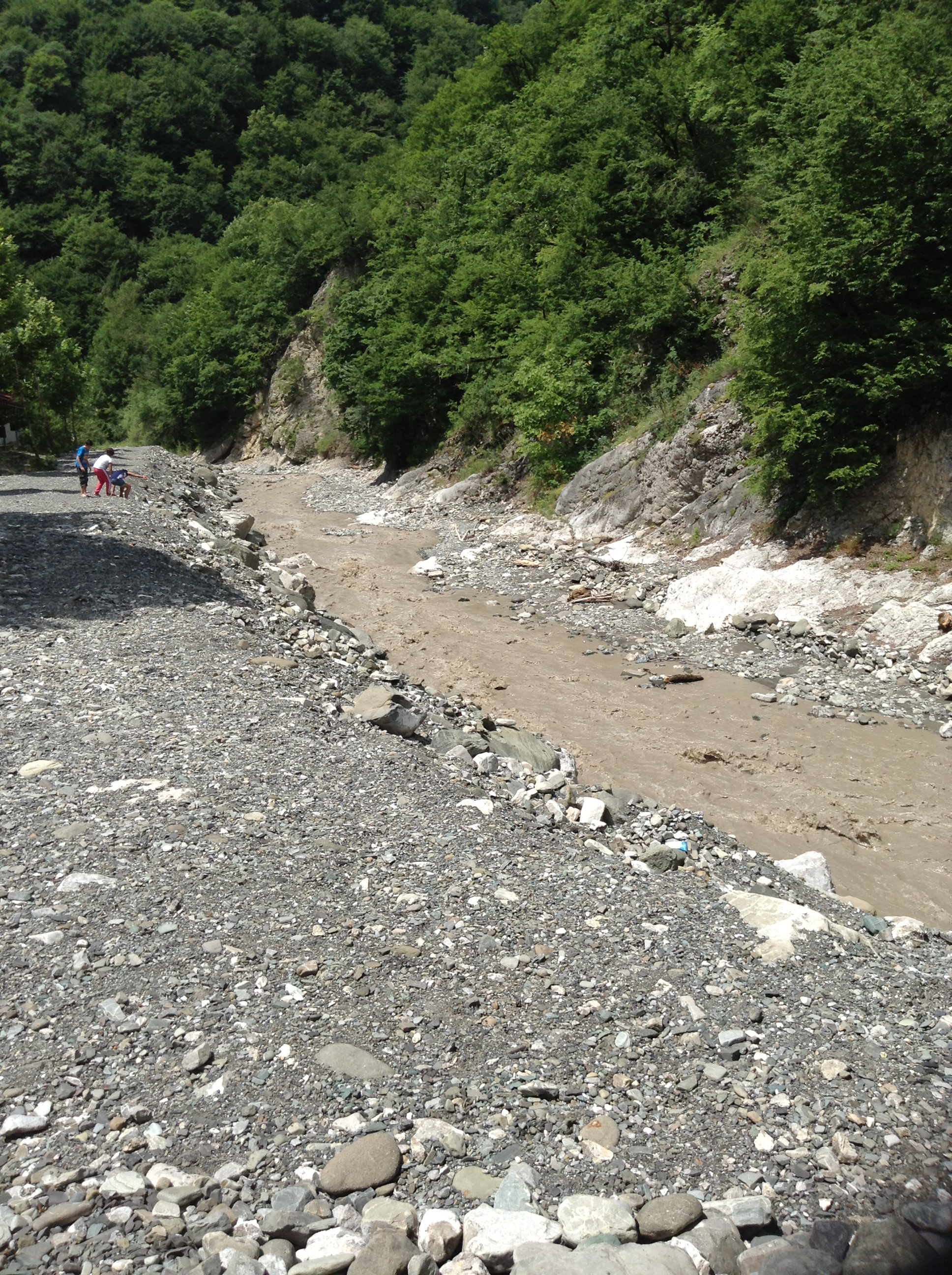 Çay 3